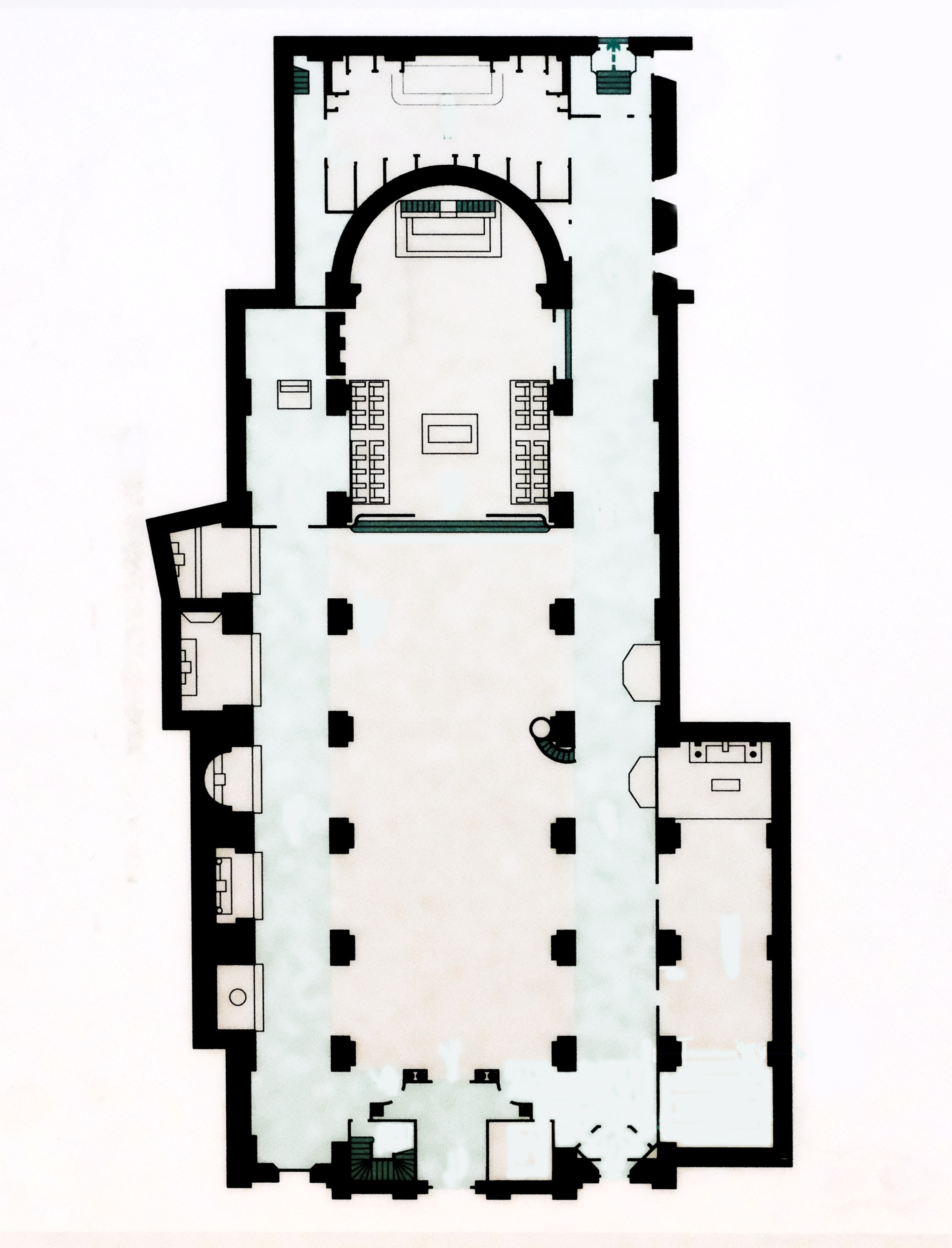 Église Notre-Dame-des-Blancs-Manteaux (plan d'après celui exposé dans l'église)) - Paris IV